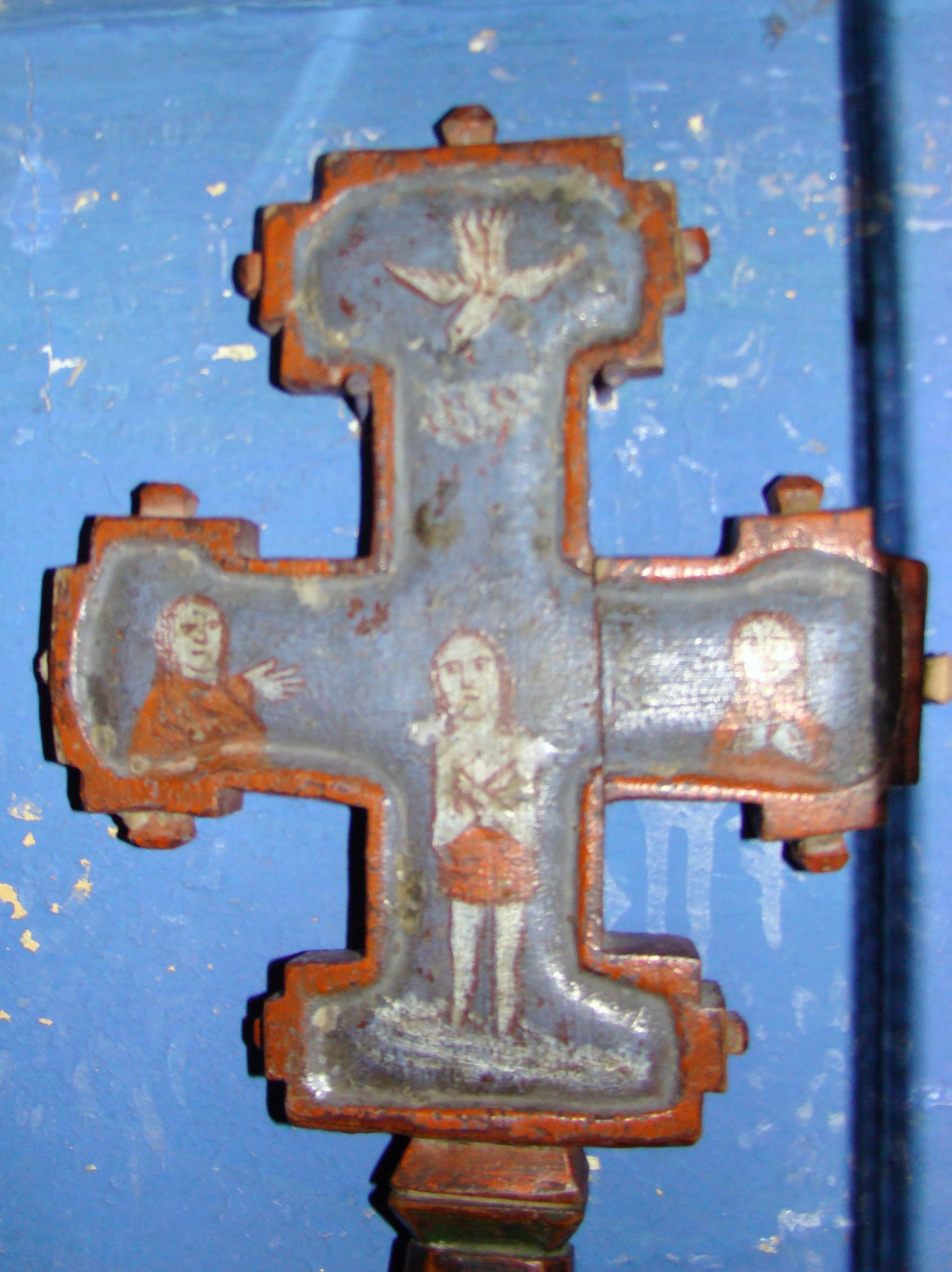 Biserica de lemn "Sfinții Împăraţi" din Aspra